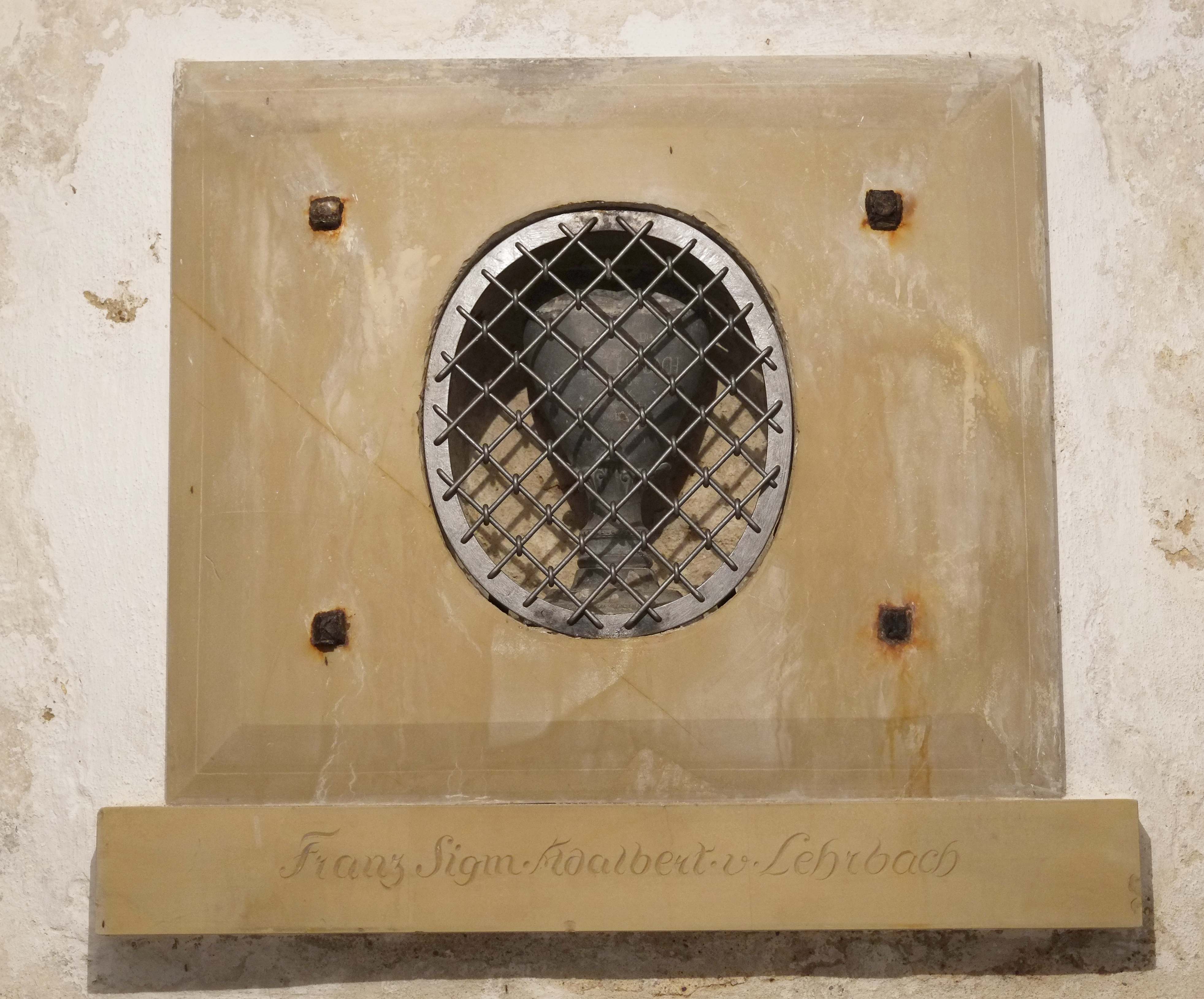 Mariahilfkapelle (Weißenburger Straße, hinter der Kirche St. Georg) in Ellingen im Landkreis Weißenburg-Gunzenhausen (Bayern); Zinnkapsel mit dem Herz des letzten fränkischen Landkomturs Franz Sigismund Adalbert Freiherr von und zu Lehrbach